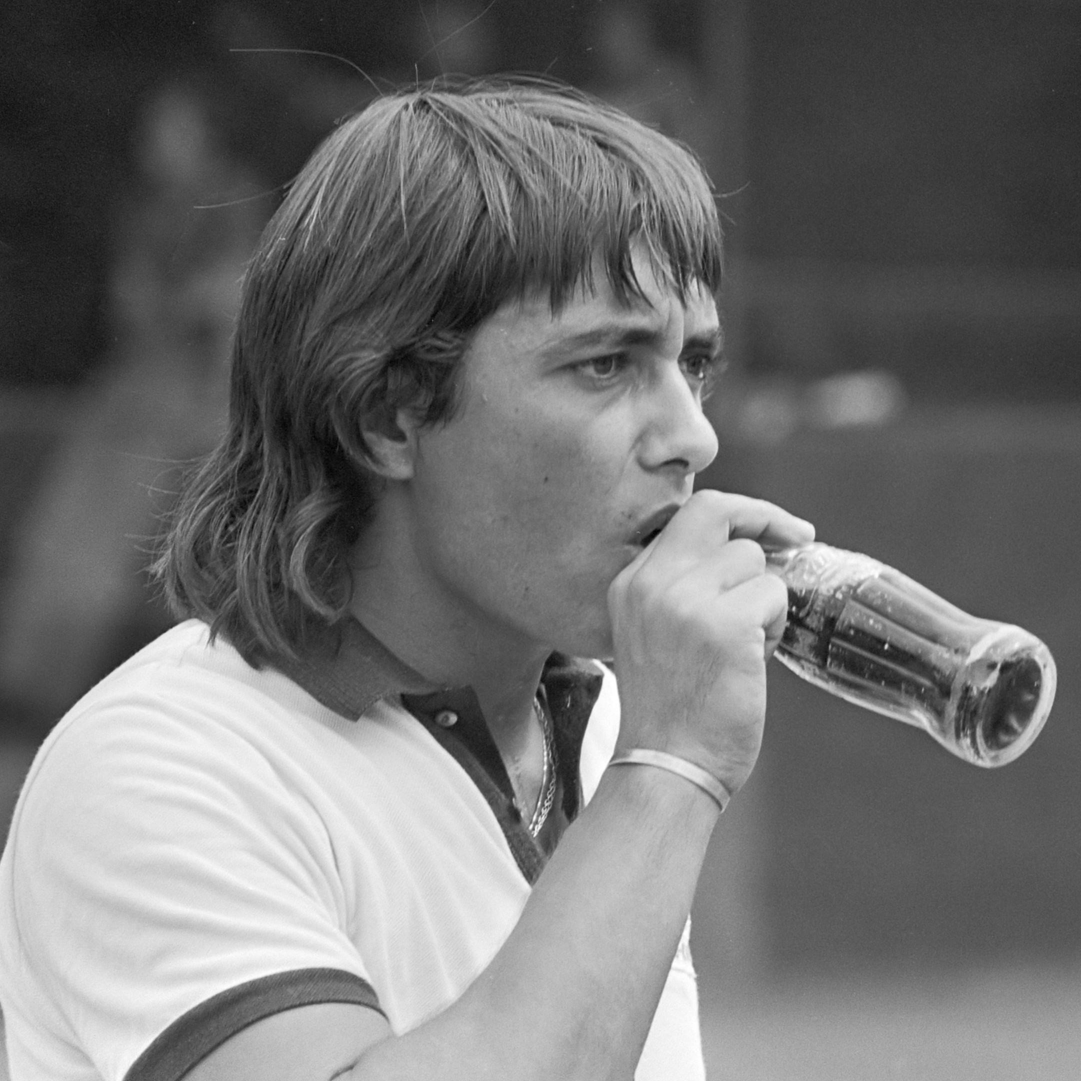 Internationale tenniskampioenschappen Melkhuisje, Prajoux drinkt uit flesje 15 juli 1976